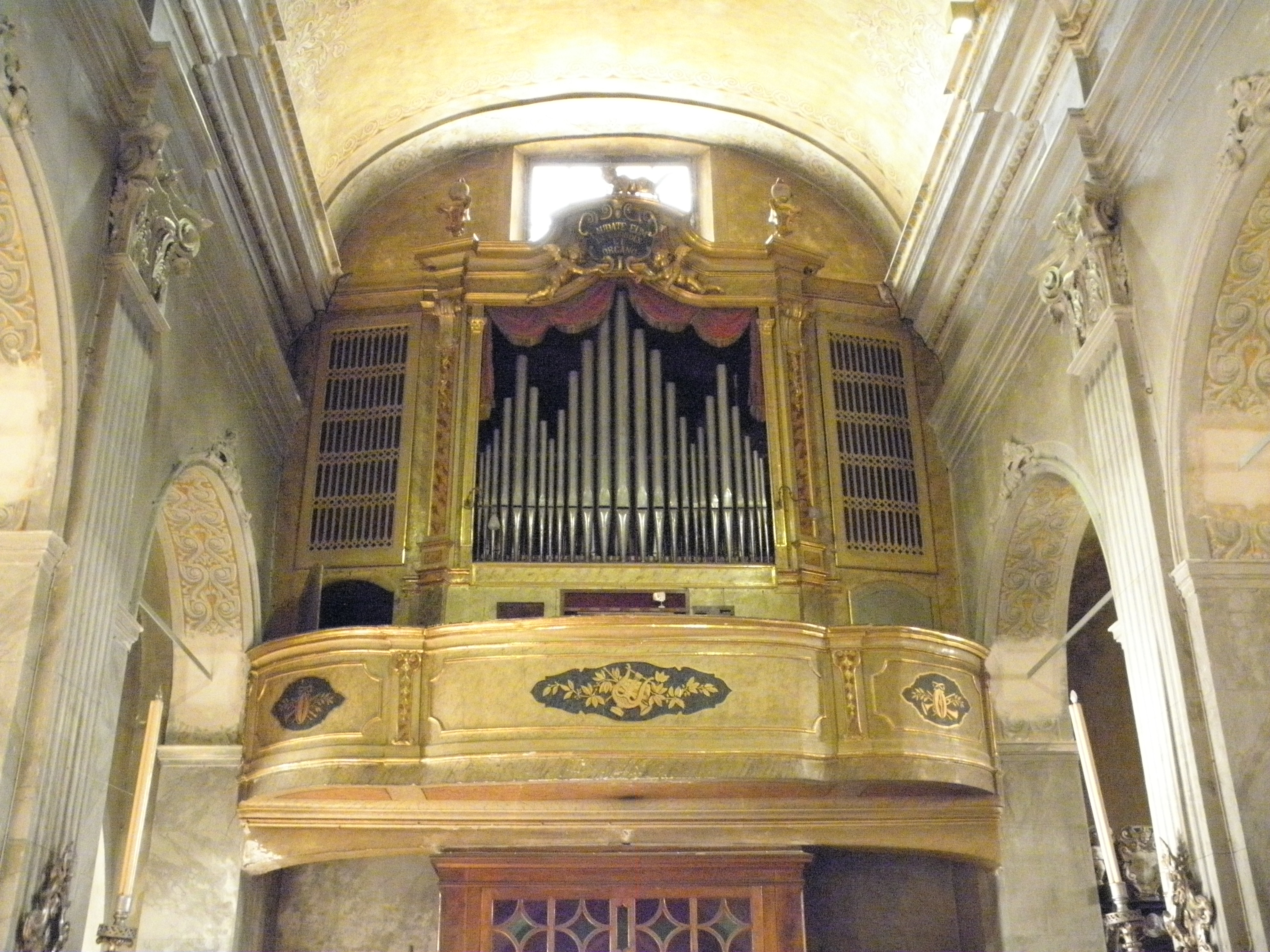 Sissa, già comune autonomo, frazione di Sissa Trecasali: chiesa parrocchiale di Santa Maria Assunta, interno, cantoria e organo.